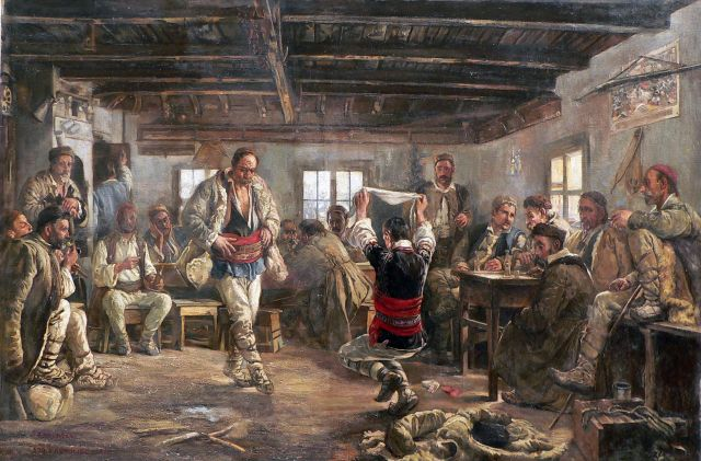 Иван Мърквичка. "Ръченица"